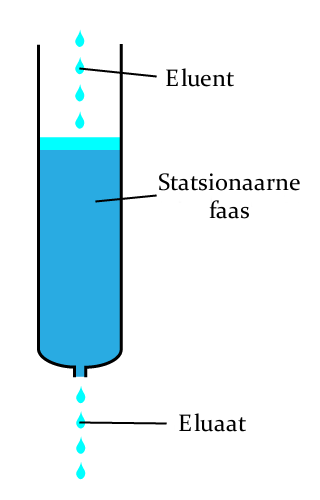 Elueerimine